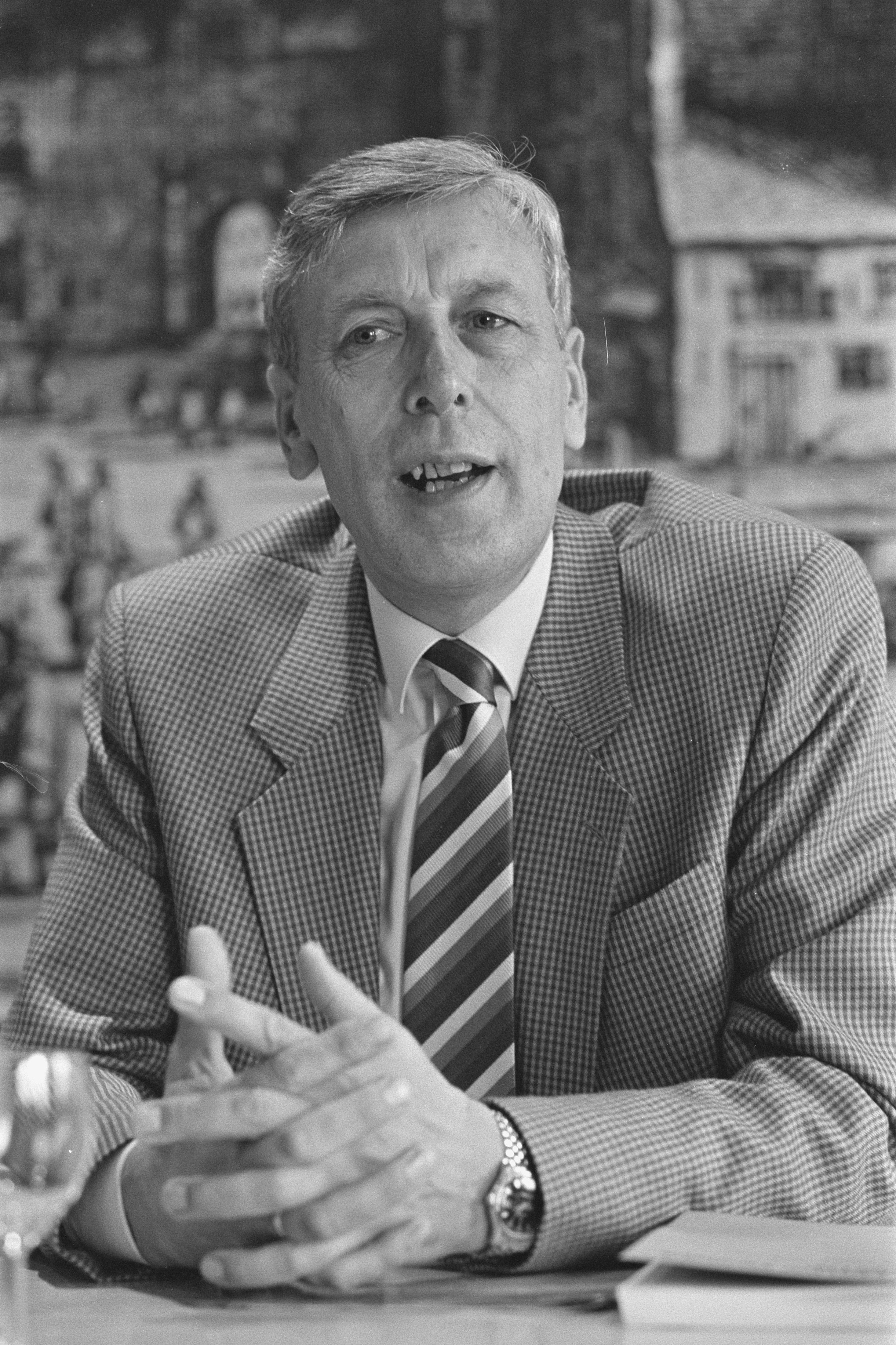 Collectie / Archief : Fotocollectie Anefo Reportage / Serie : [ onbekend ] Beschrijving : Presentatie proefschrift "de Nieuw-Guinea kwestie" door P. B. R. de Geus ; oud minister De Geus Datum : 25 juni 1984 Trefwoorden : auteurs, portretten, presentaties Persoonsnaam : Geus, P.B.R. de Fotograaf : Antonisse, Marcel / Anefo Auteursrechthebbende : Nationaal Archief Materiaalsoort : Negatief (zwart/wit) Nummer archiefinventaris : bekijk toegang 2.24.01.05 Bestanddeelnummer : 933-0132